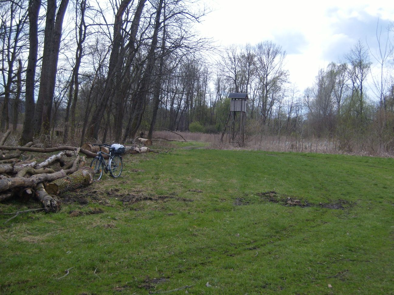 07 Rast in den Murauen bei Turjanci